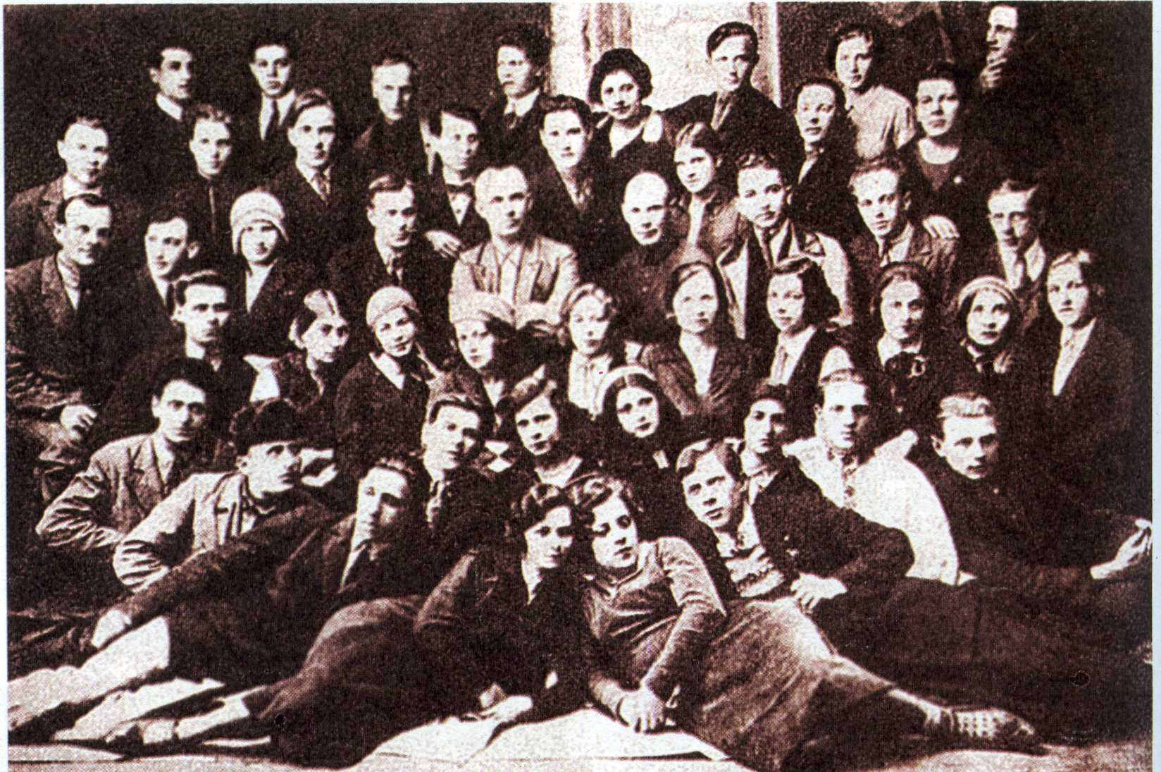 Беларуская (тарашкевіца): Трупа Беларускага трэцяга дзяржаўнага тэатру, 1933